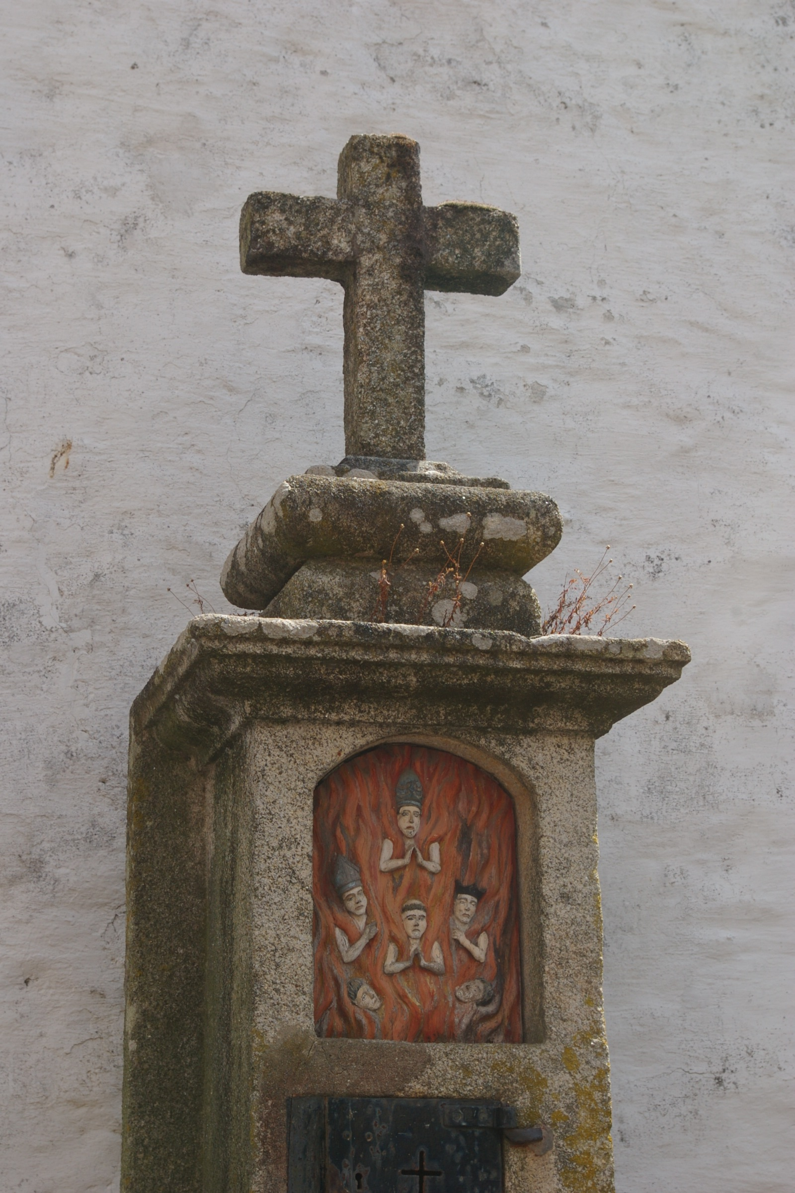 Peto de ruegos y donativos para las ánimas en el purgatorio.